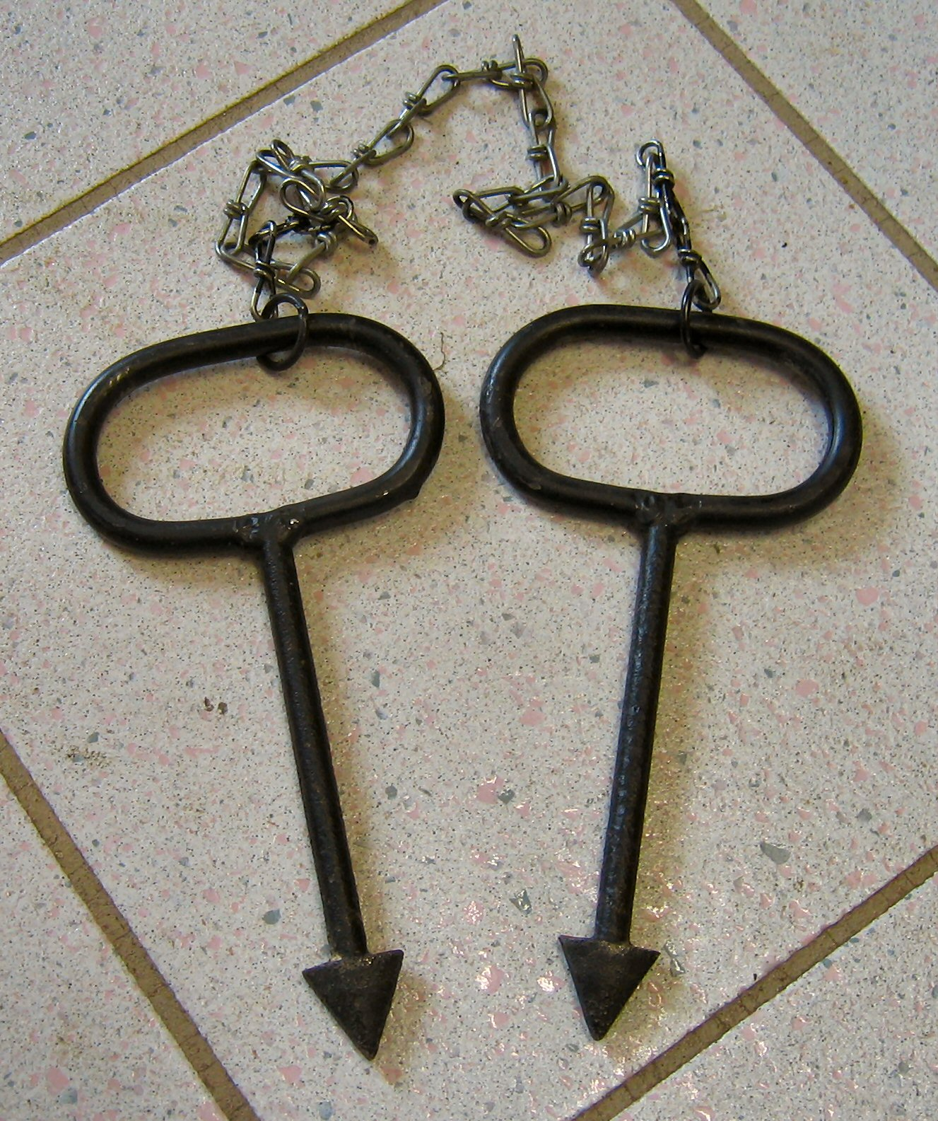 Schachthaken